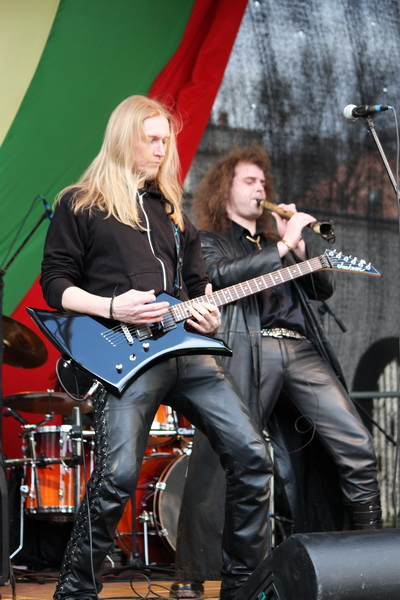 Grupės Thundertale nariai Jonas (priekyje) ir Shillas.